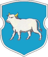 Herb miasteczka Sopoćkinie